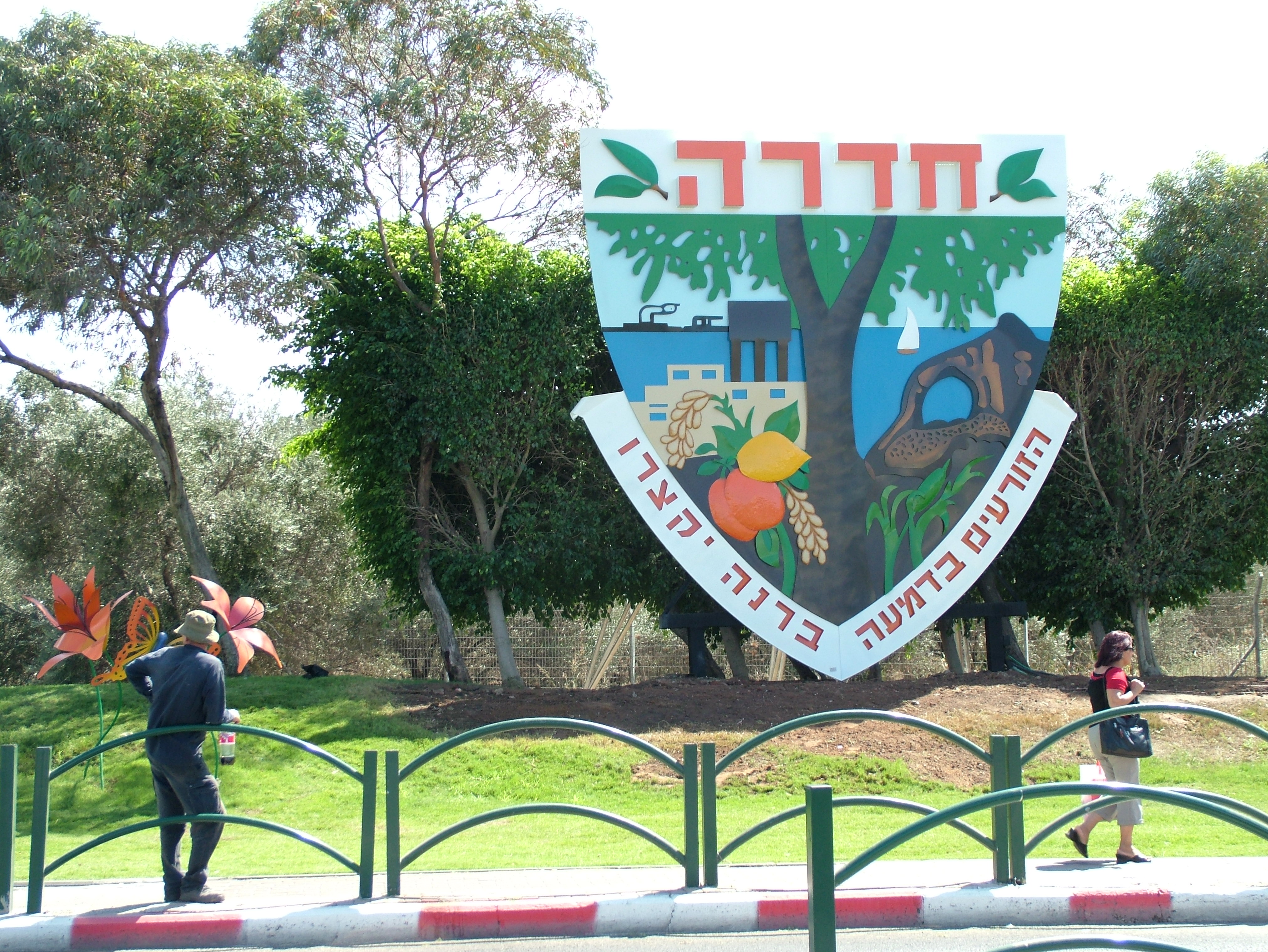 מיצג אמנות. אמן: ישראל פרימו